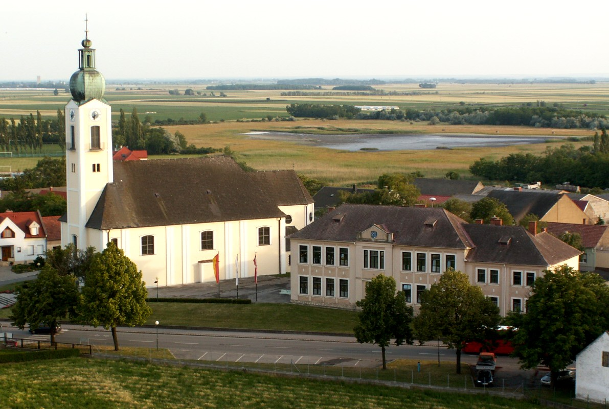 Pfarrkirche und Volksschule der Marktgemeinde Sankt Andrä am Zicksee. Im Hintergrund ist die Baderlacke zu sehen.